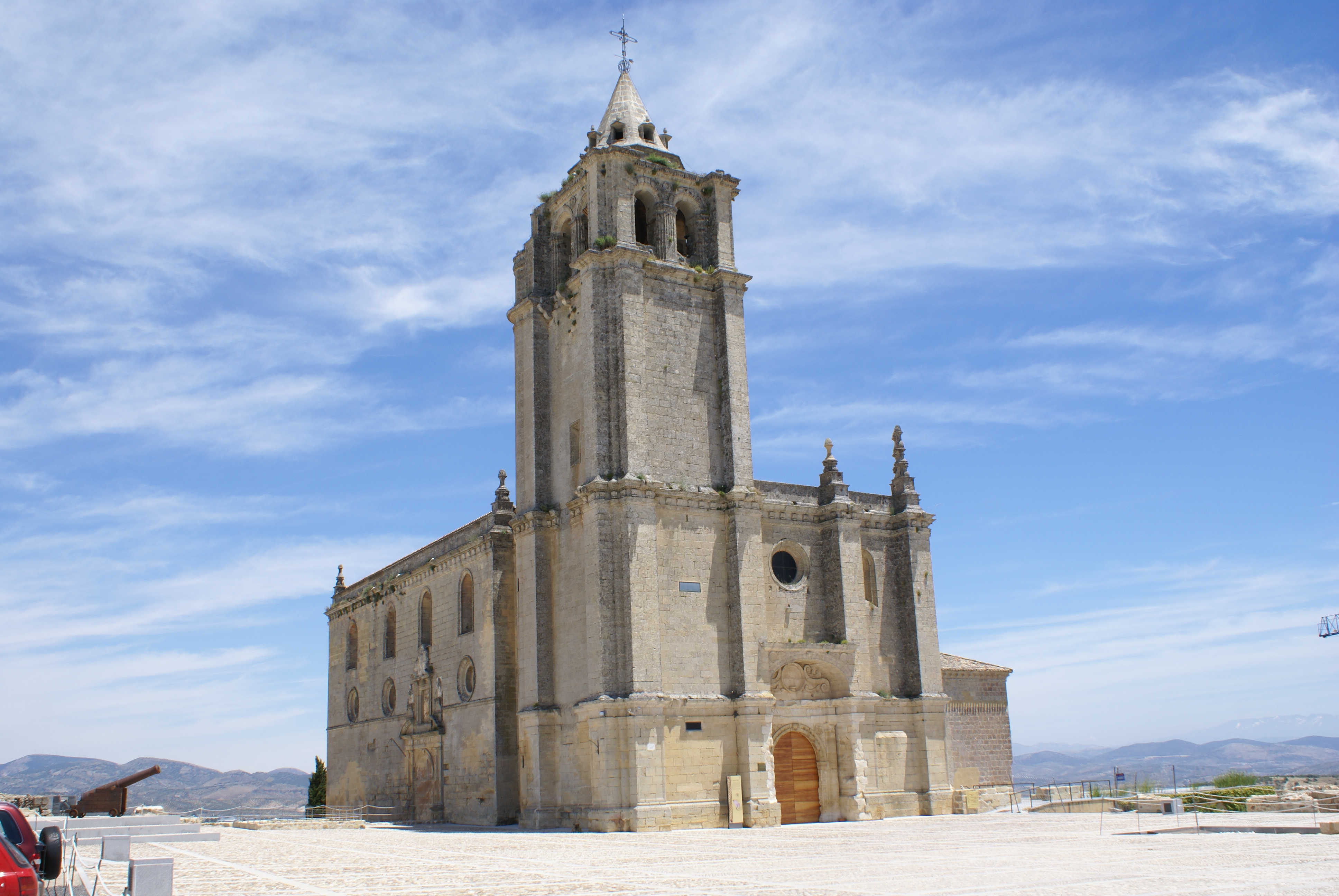 Iglesia Mayor Abacial de la Fortaleza de La Mota (Alcalá la Real, provincia de Jaén, Andalucía, España).